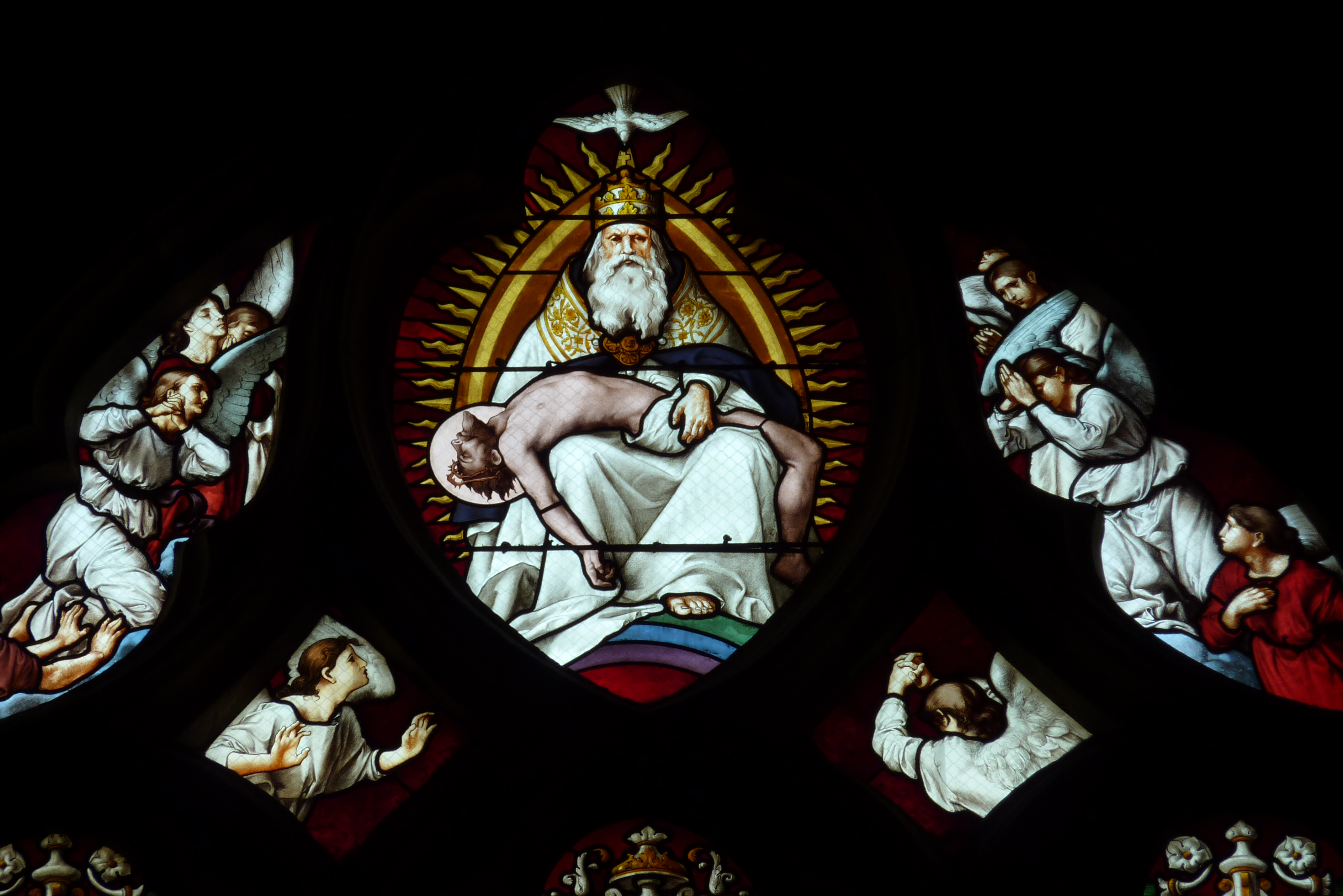 Ausschnitt des Bleiglasfensters Nr. 14 (19. Jahrhundert) in der katholischen Pfarrkirche Saint-Martin (Collégiale Saint-Martin) in Montmorency, Darstellung: Gnadenstuhl (siehe: Dominique Foussard, Charles Huet, Mathieu Lours: Églises du Val-d'Oise. Pays de France, Vallée de Montmorency, Société d'Histoire et d'Archéologie de Gonesse et du Pays de France, 2. Auflage, Gonesse 2011, ISBN 9782953155426)